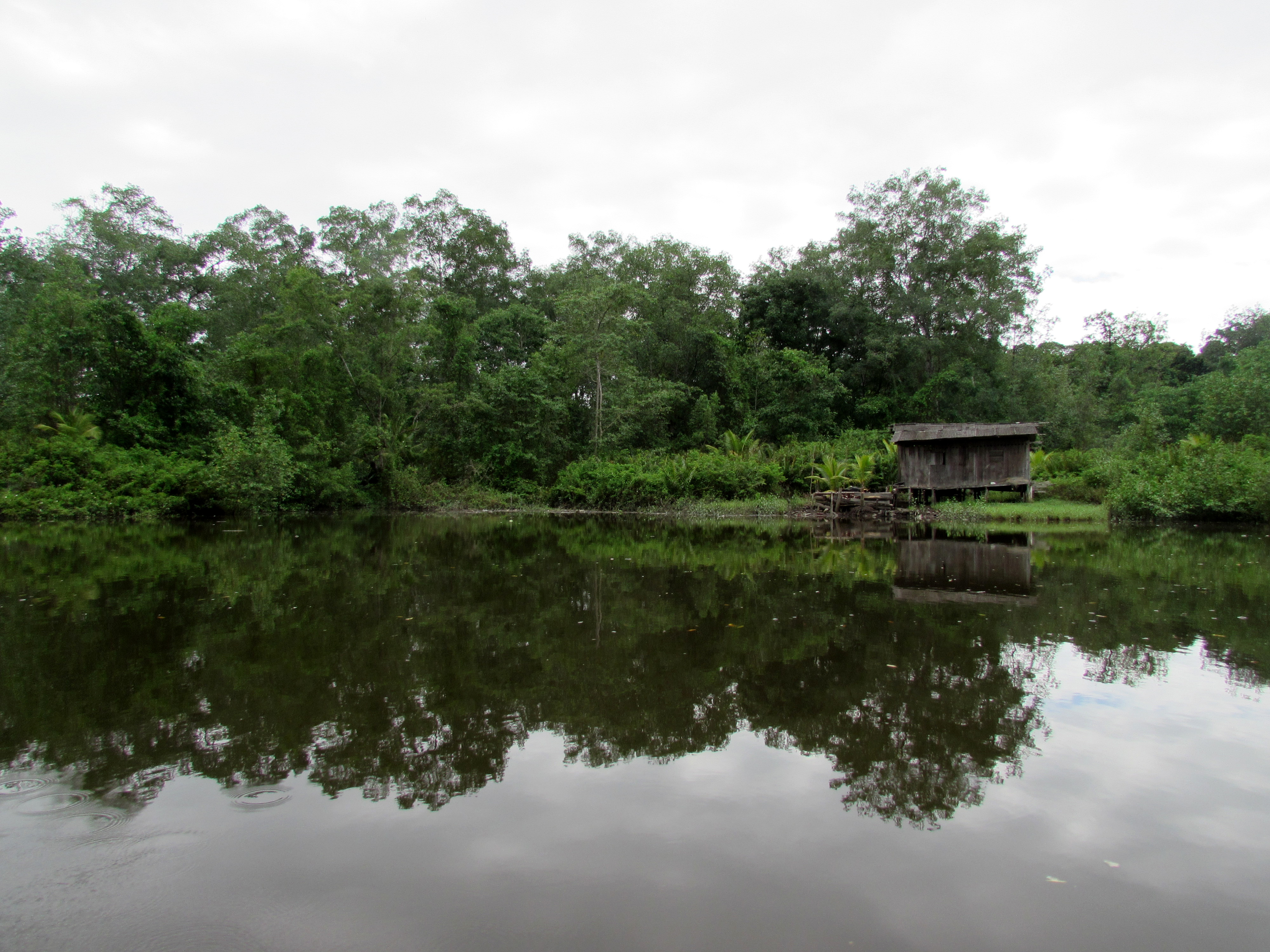 Tumaco La Perla Del Pacifico